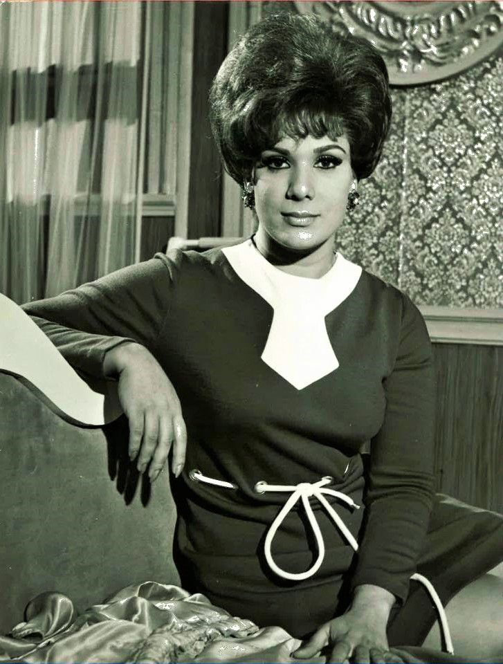 شهین کی سر